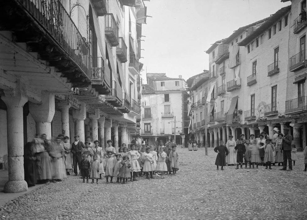 Imatge